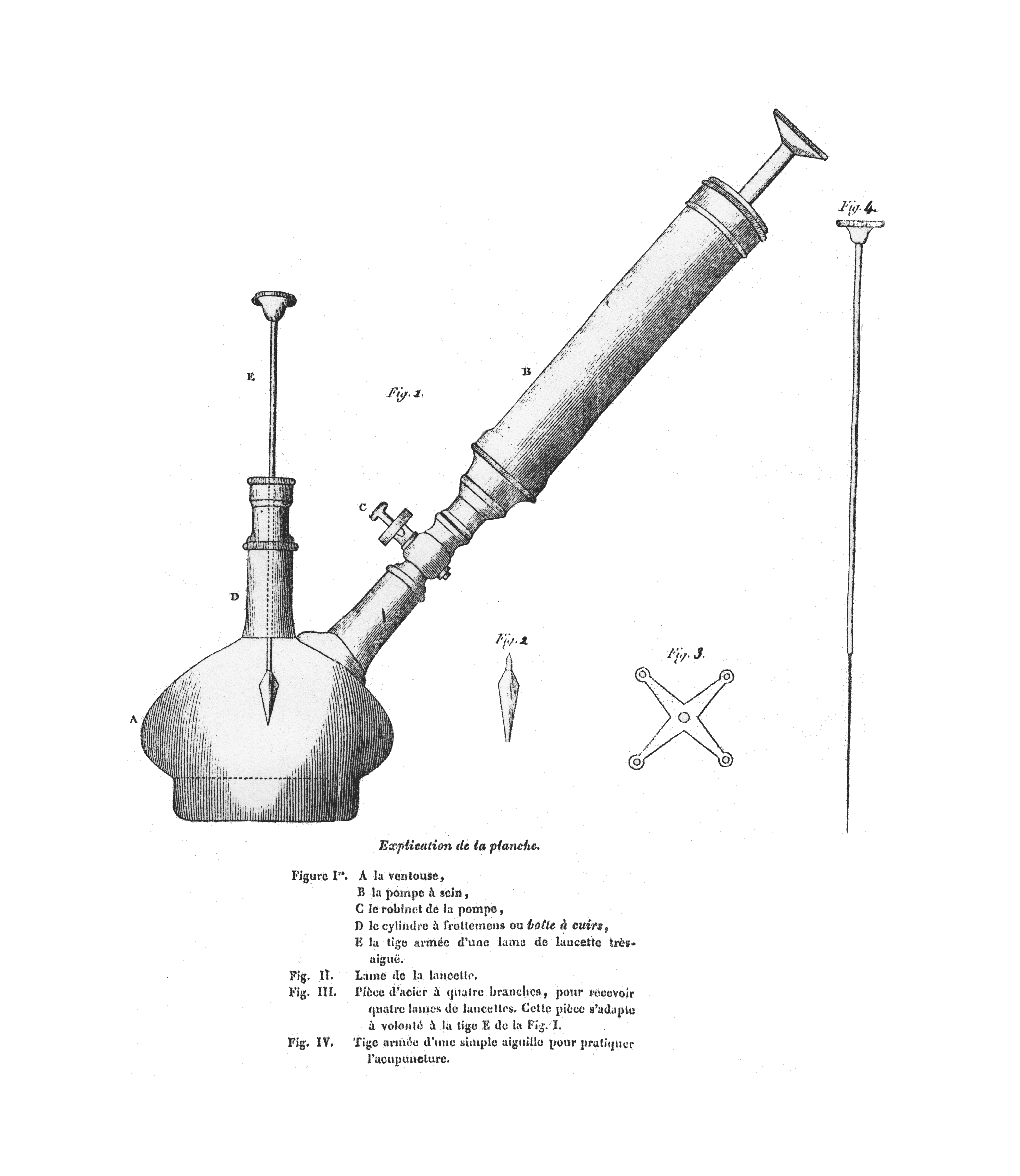 Schröpfgerät